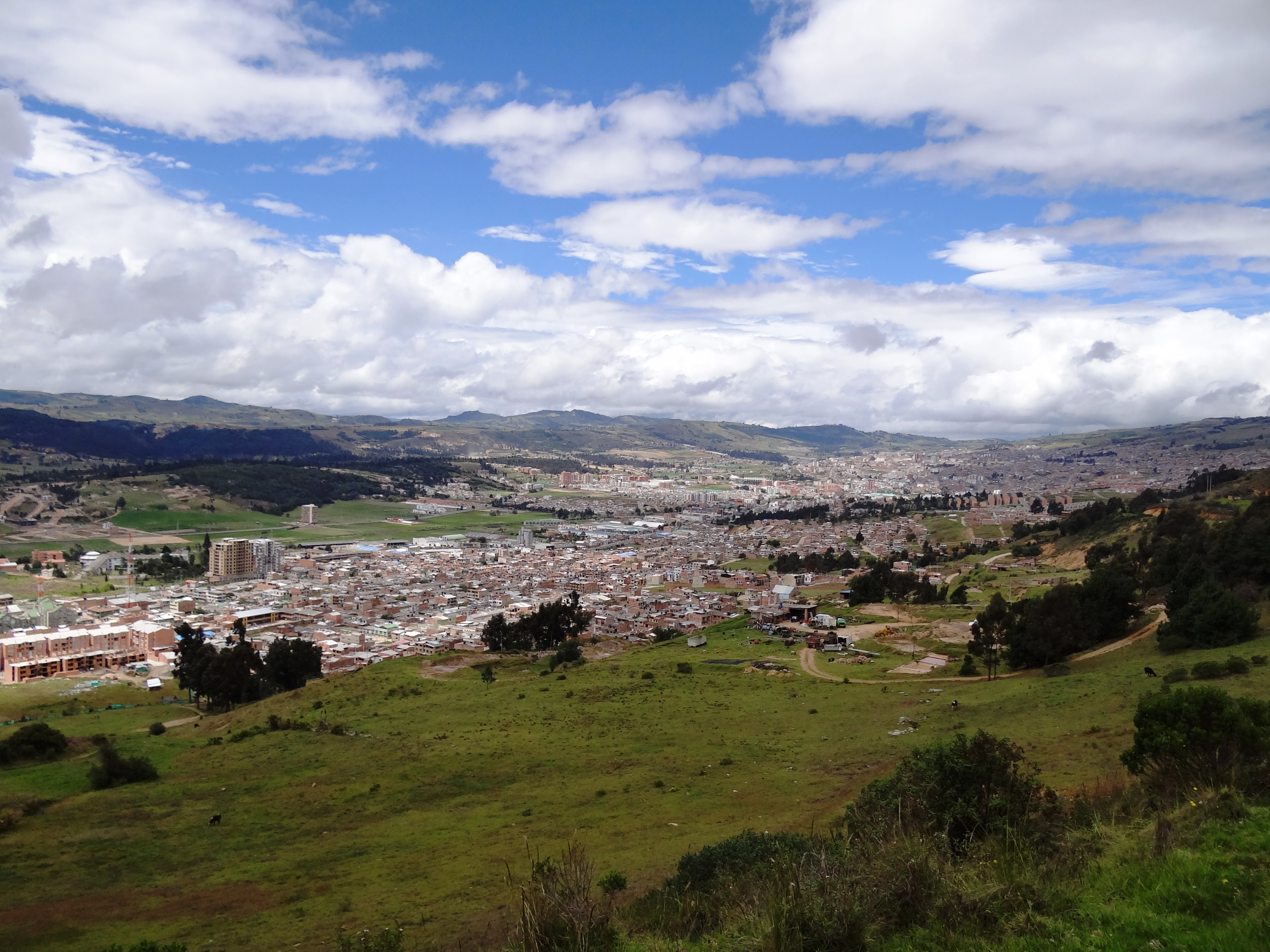 dDetalle desde el norte de la ciudad de Tunja, departamento de Boyacá, Colombia.